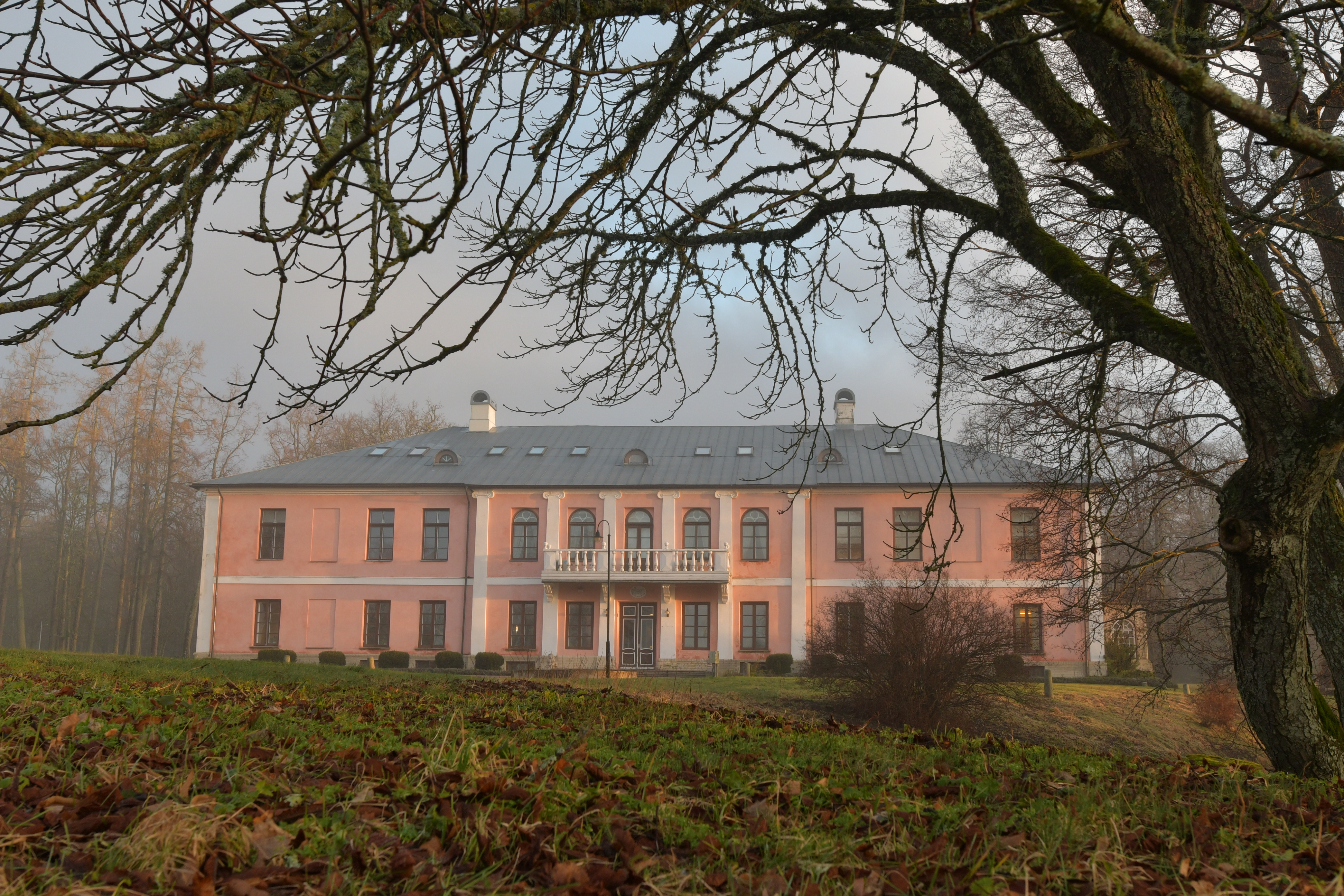 Tõstamaa mõis varakevadel